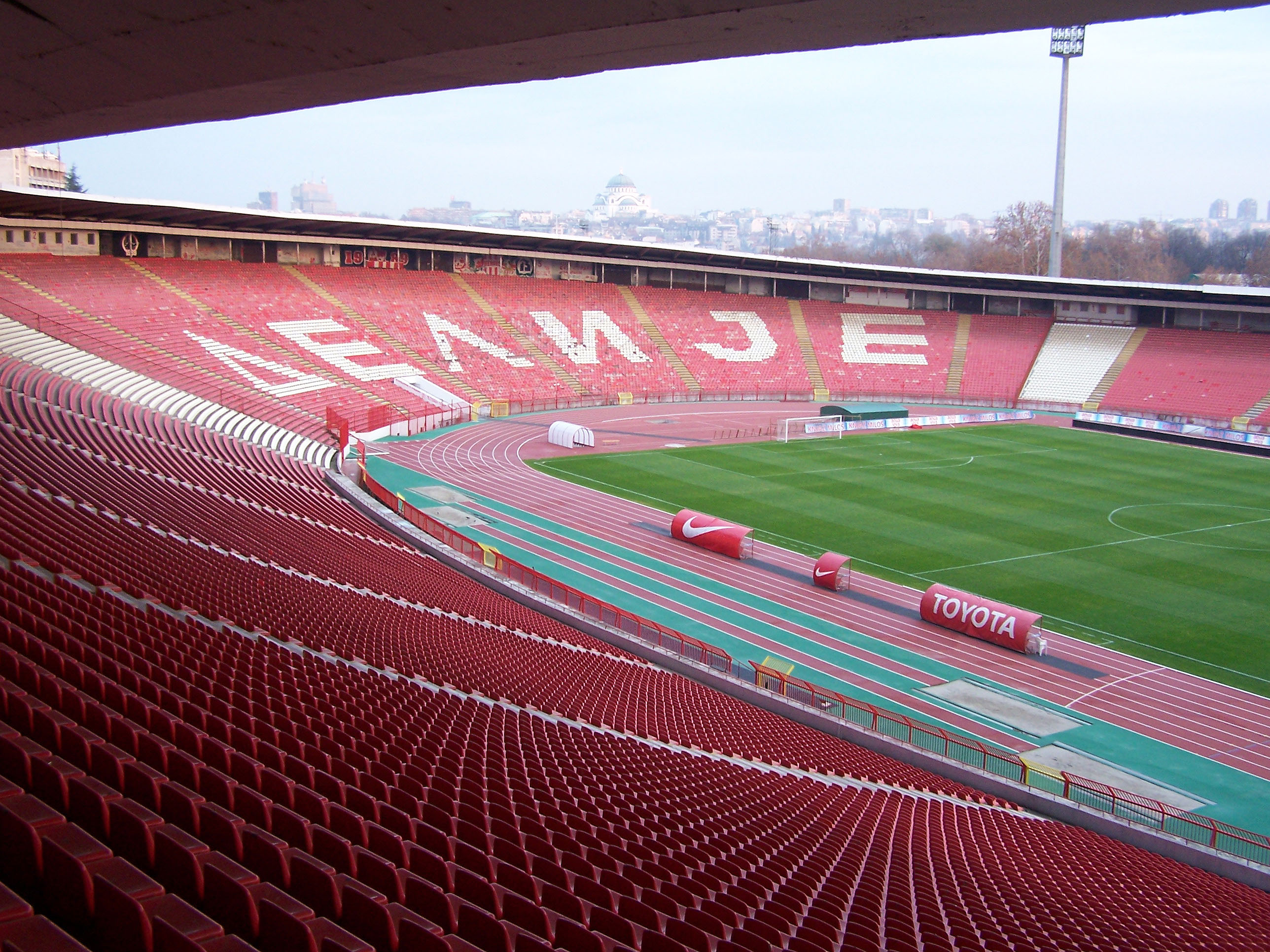 Delije Sever section at Stadion Crvena Zvezda in Belgrade